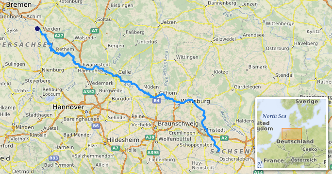 carte réalisée sur umap [1] This map may be incomplete, and may contain errors. Don't rely solely on it for navigation.